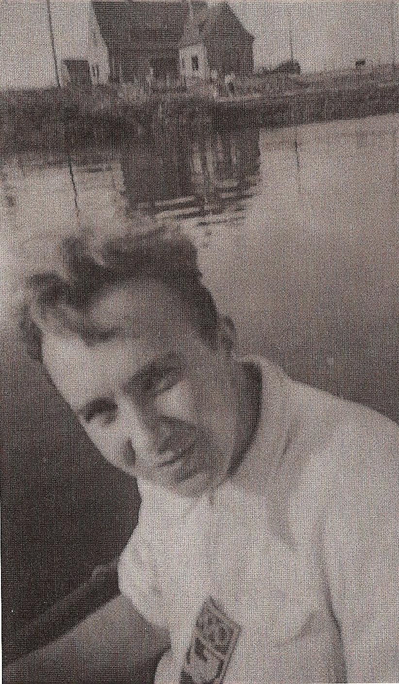 Julien Bogaert op de Olympische Zomerspelen van 1948 in London